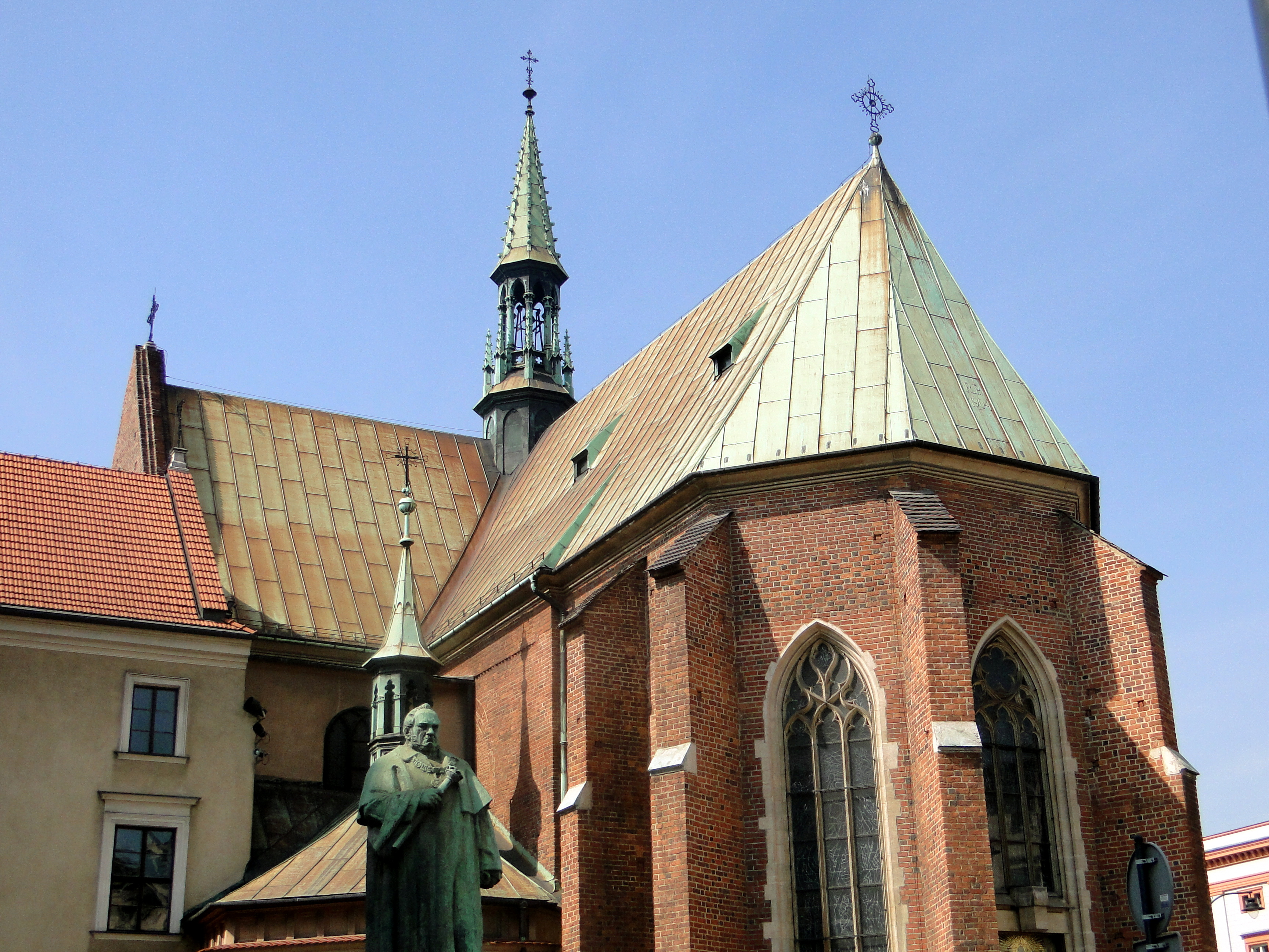 Kościół p.w. św. Franciszka z Asyżu w Krakowie